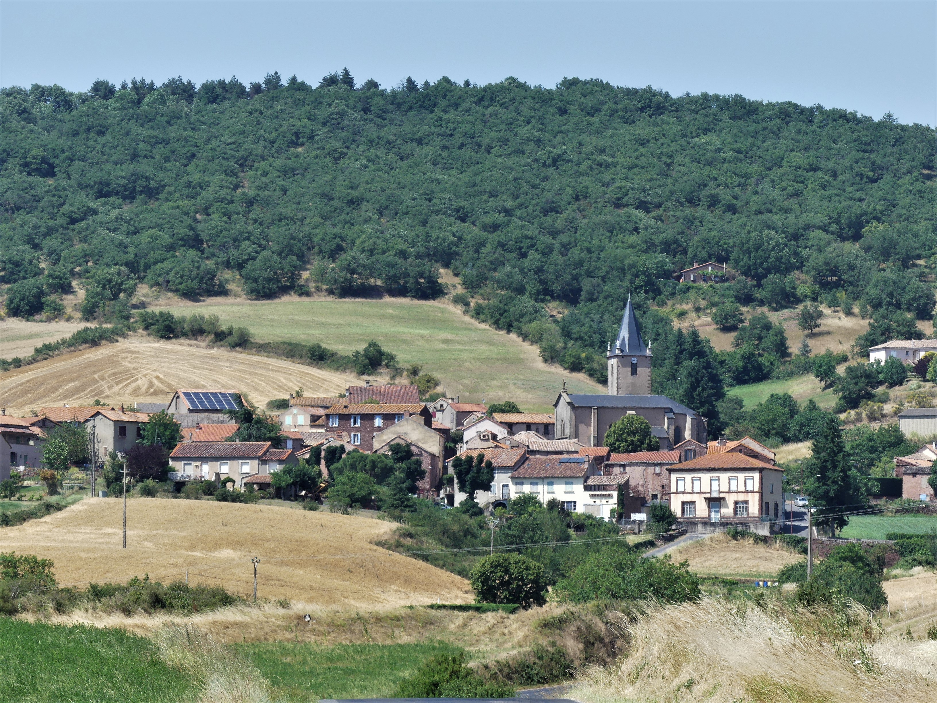 Le bourg de Rebourguil, Aveyron, France.